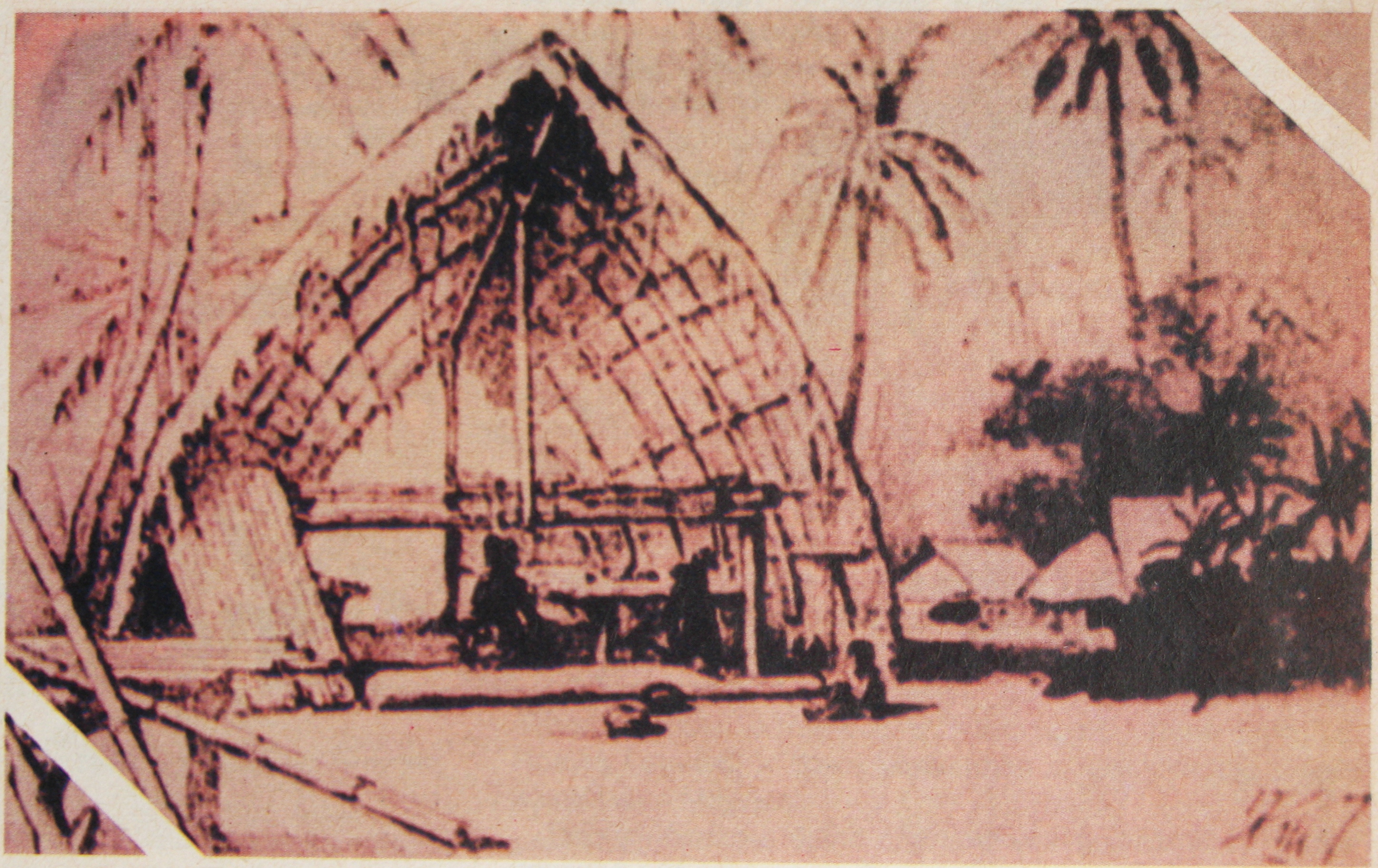 Папуасское жилище на Новой Гвинее. Виден русский флаг, за домом горы. Рисунок 1871, 72, 1876 или 77 года. Опубликовано в "Вокруг света", 1886.